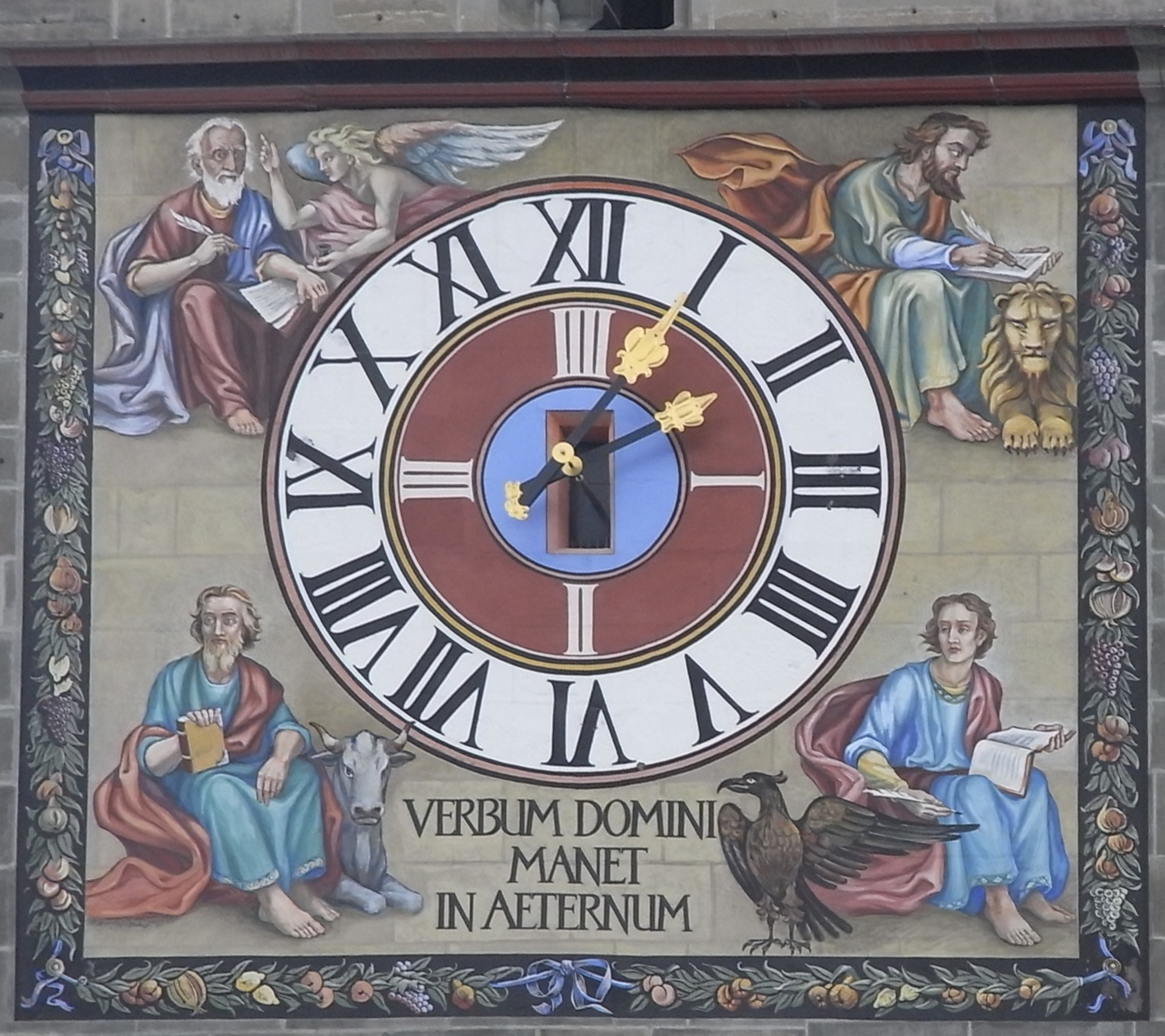 Turmuhr der Schwarzen Kirche in Kronstadt (RO) mit den vier kanonischen Evangelisten.